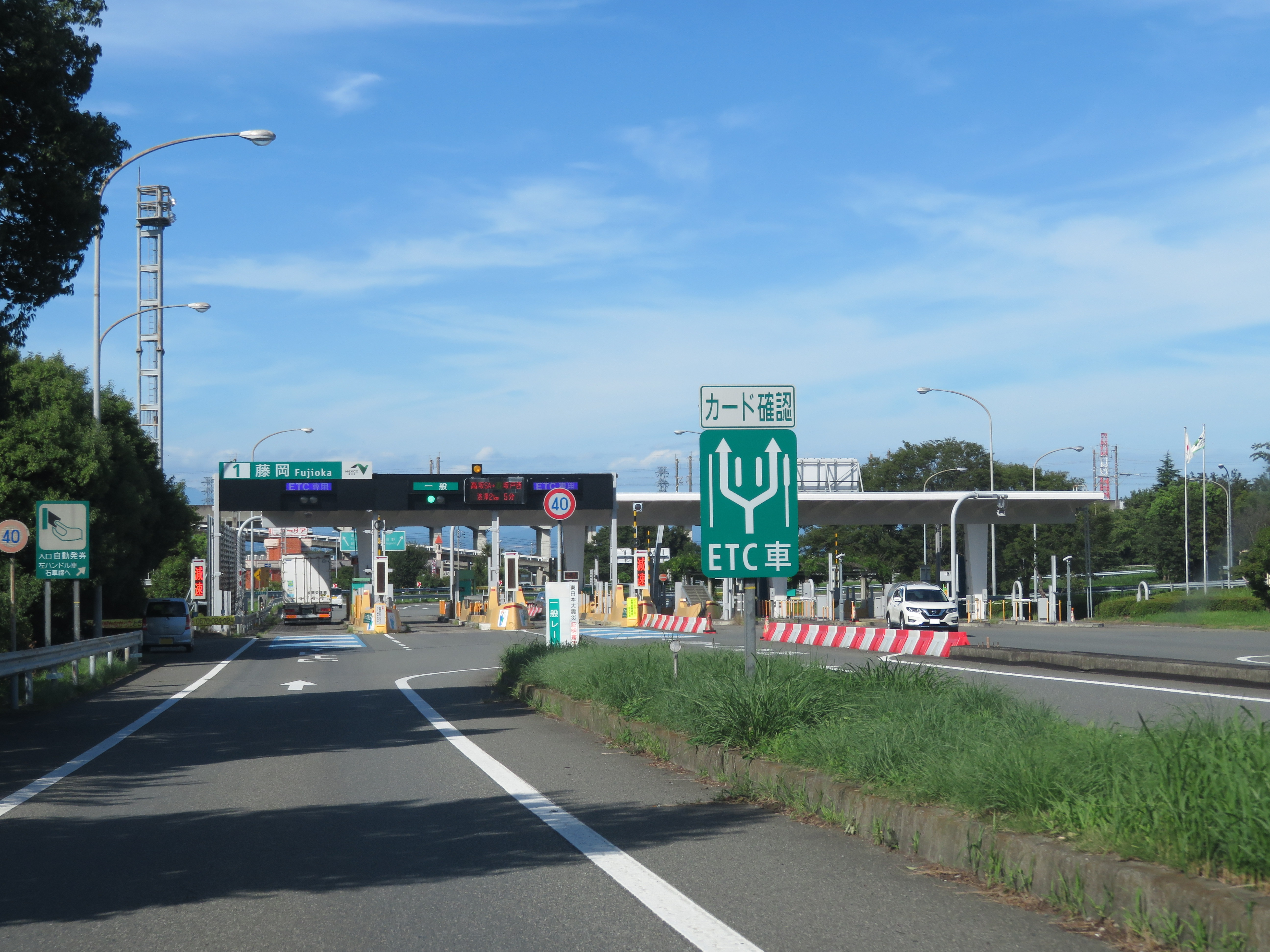 上信越自動車道藤岡インターチェンジ料金所付近 Canon PowerShot SX720 HS